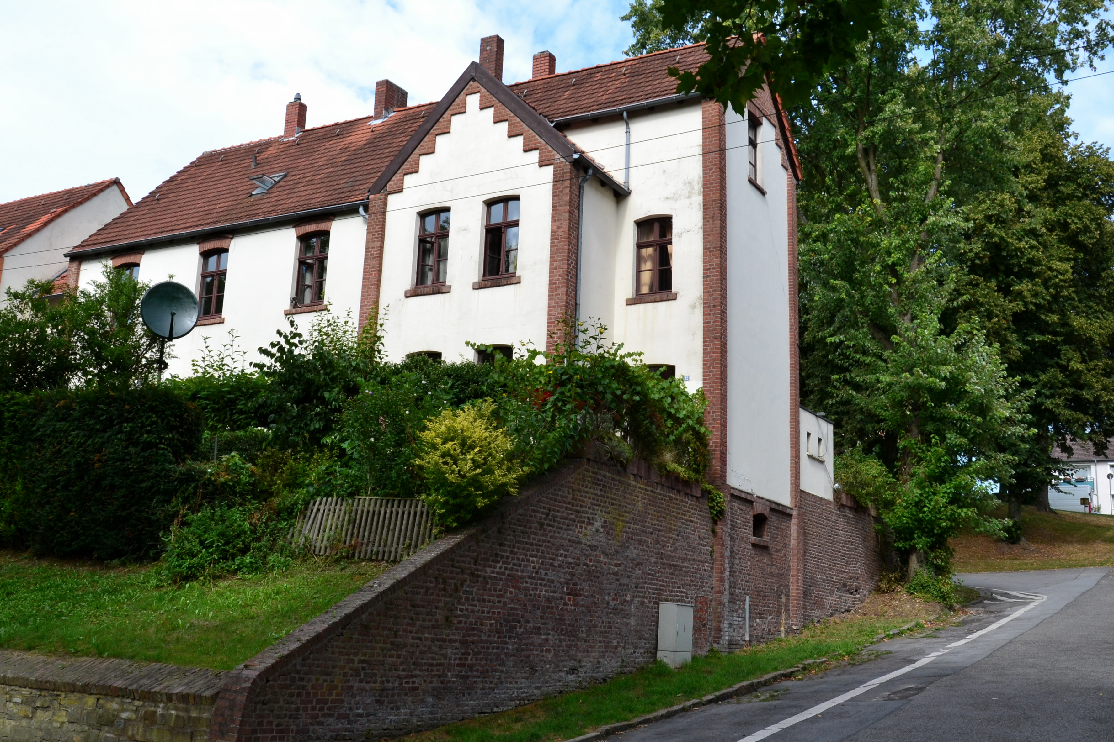 Wohnhaus der Siedlung Carl Funke in Essen-Heisingen, unter Denkmalschutz